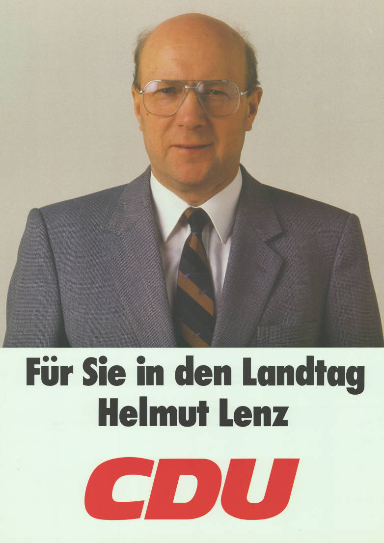 Für Sie in den Landtag Helmut Lenz CDU Abbildung: Porträtfoto Kommentar: Rückseitig mit Tuschstift beschriftet. Plakatart: Kandidaten-/Personenplakat mit Porträt Objekt-Signatur: 10-007 : 705 Bestand: Landtagswahlplakate Hessen (10-007) GliederungBestand10-18: Landtagswahlplakate Hessen (10-007) » CDU Lizenz: KAS/ACDP 10-007 : 705 CC-BY-SA 3.0 DE